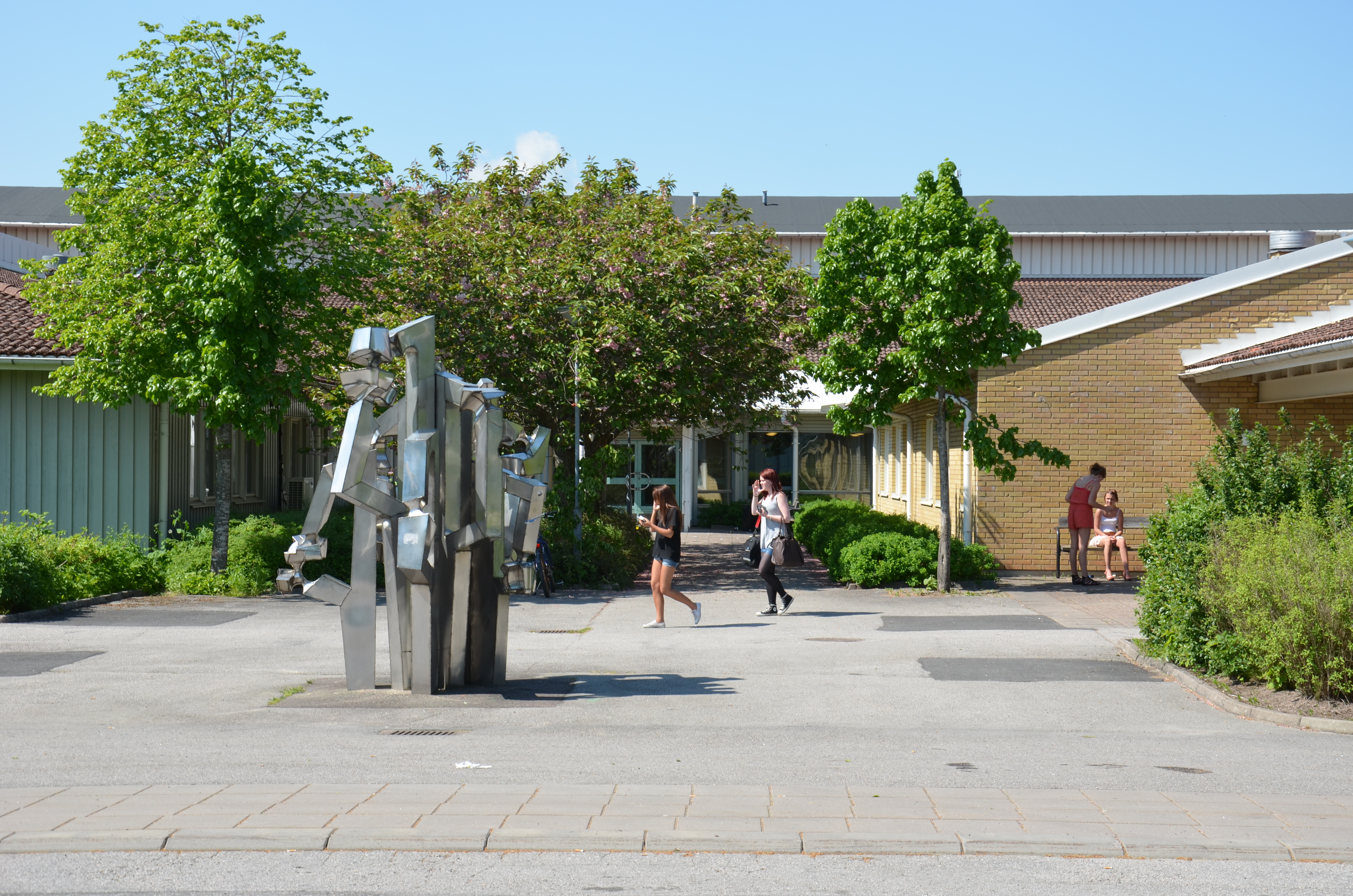 Lagmansgymnasiet i Vara, entrén